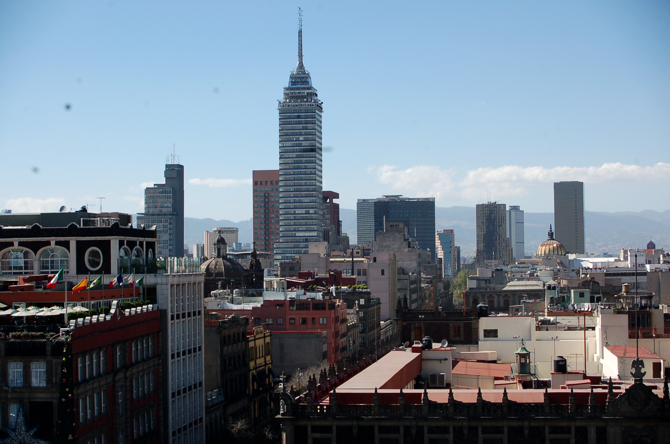 Centro Ciudad de México